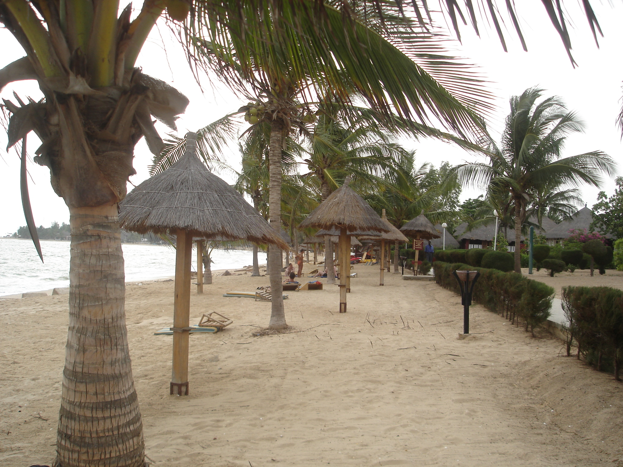 Vue sur la plage touristique de Saly . Auteur : Jean-Claude Perez